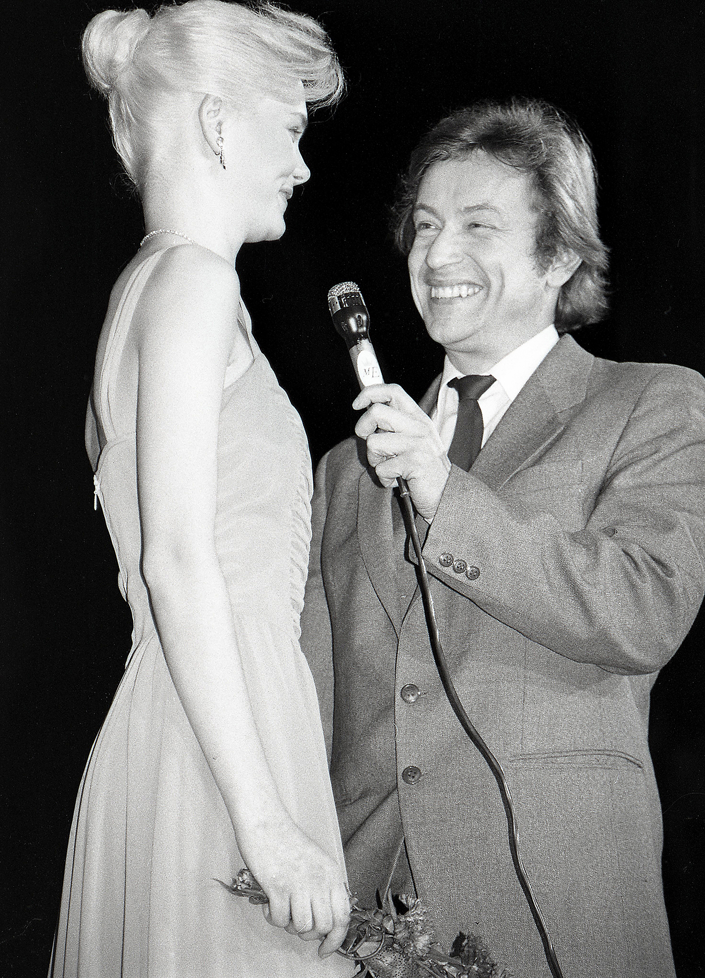 Lembitu Kuuse 88